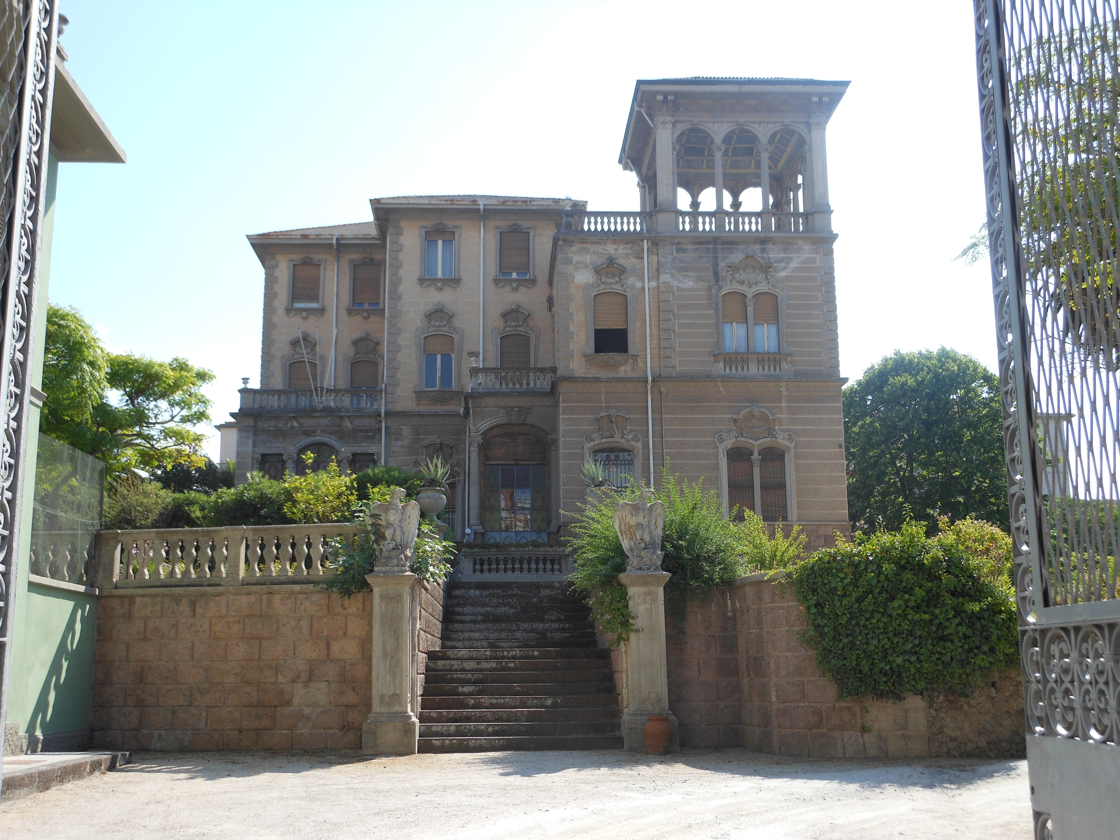 Sassari - Villa La Mimosa